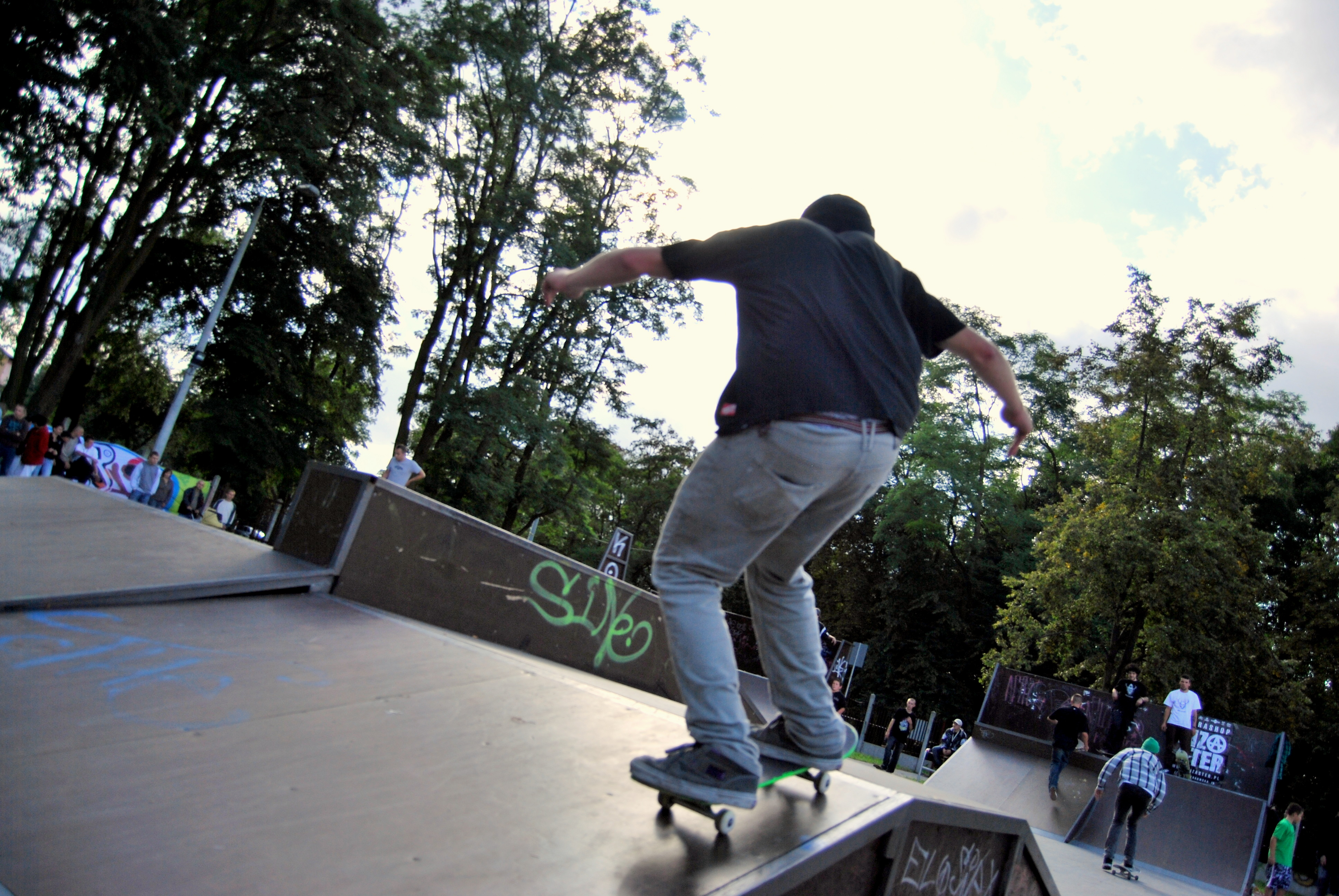 Skatepark w Błoniu